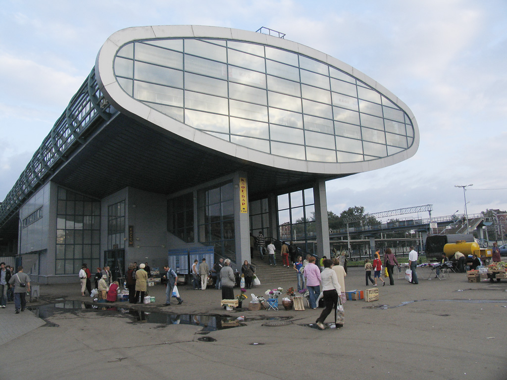 жп гарата на Митишчи.